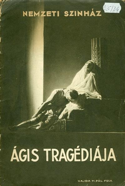 Az Ágis tragédiájának ősbemutatójának műsorfüzete.